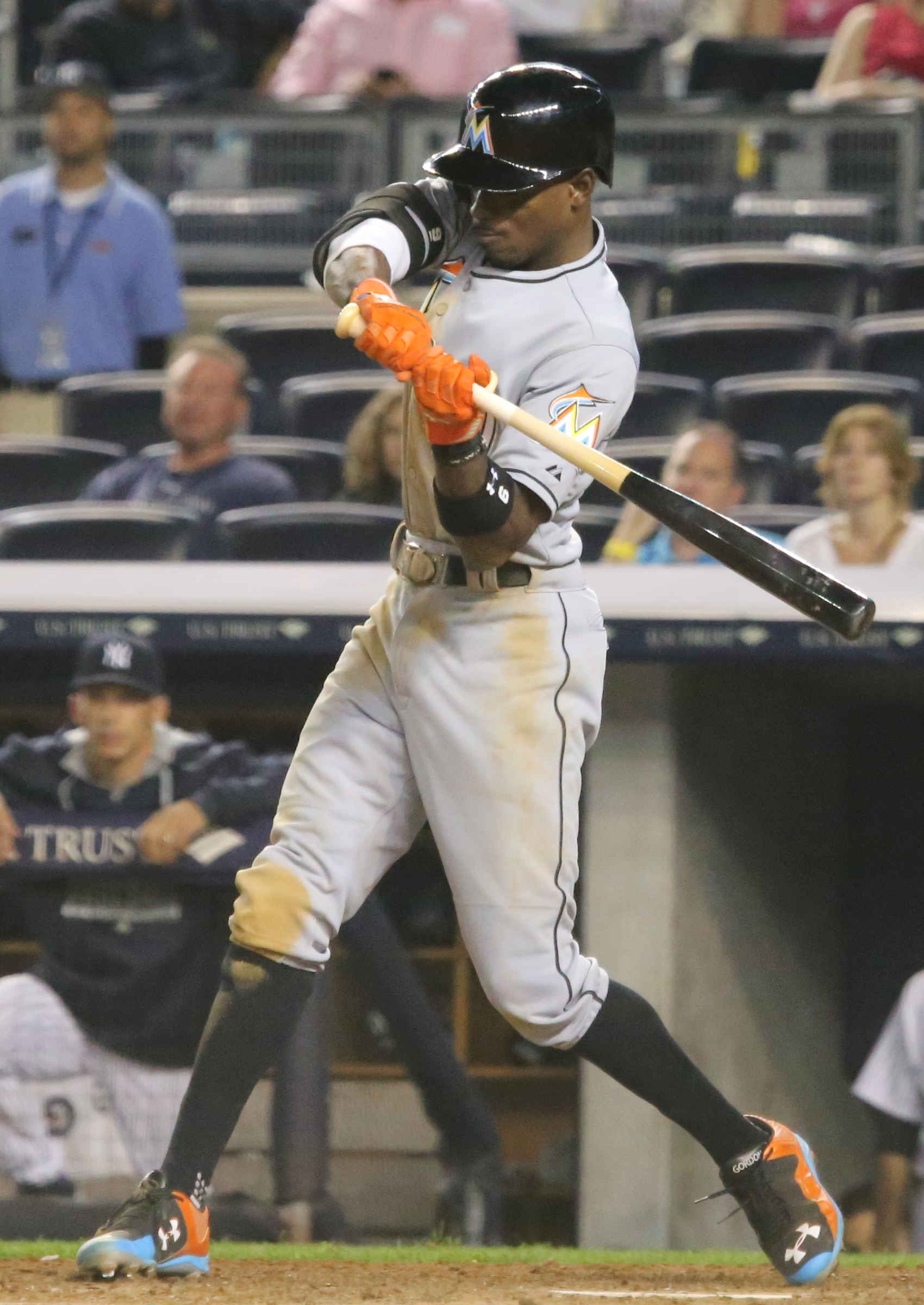 Dee Gordon